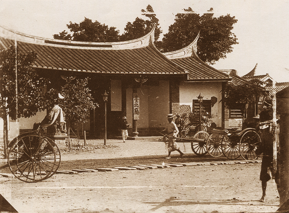 臺北廳早期辦公地點。